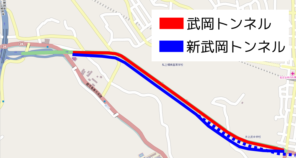 武岡トンネルと新武岡トンネルの位置図。（アップロード者が一部改変） This map may be incomplete, and may contain errors. Don't rely solely on it for navigation.